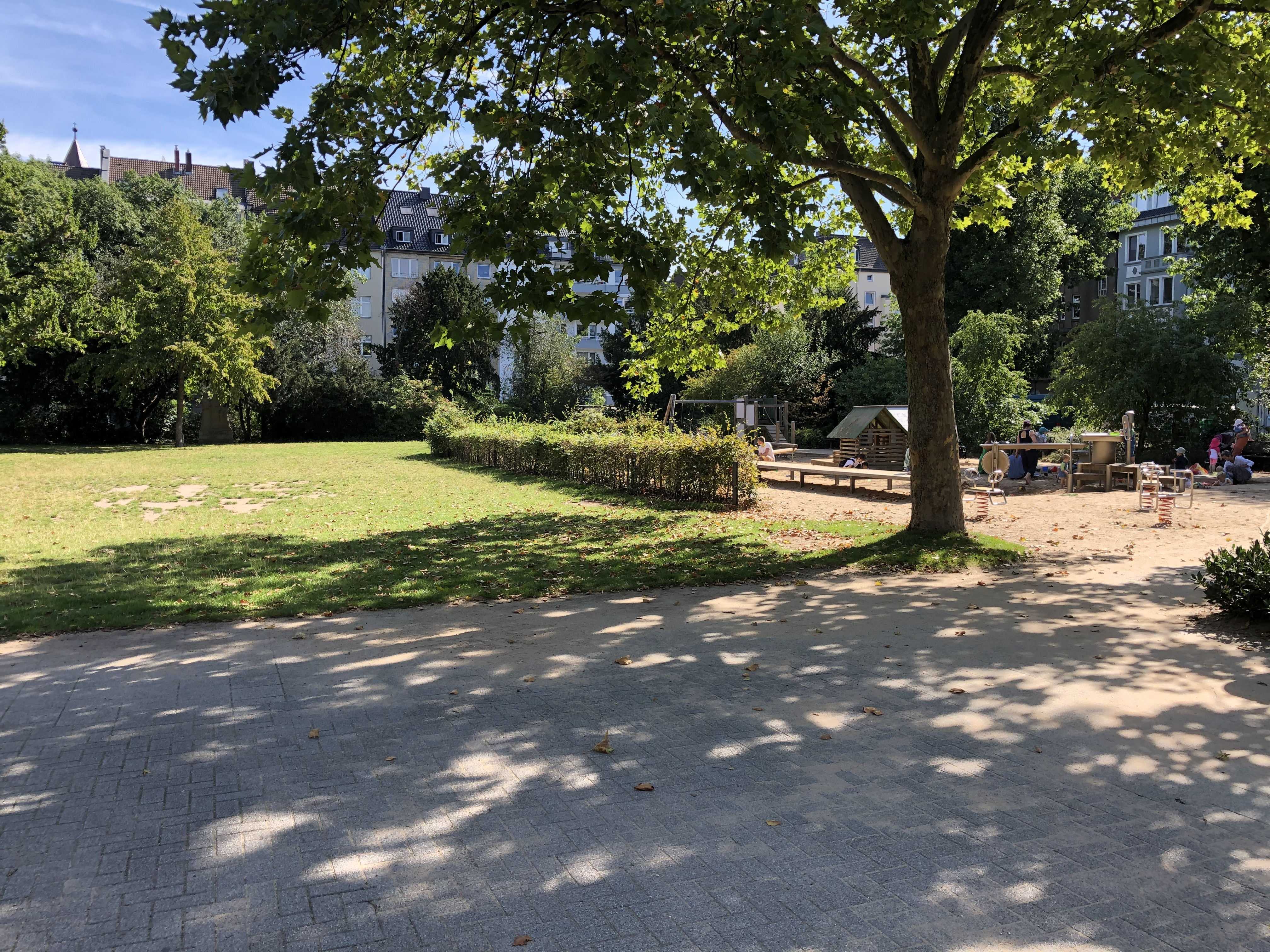 Blick auf Wiese und Kinderspielplatz